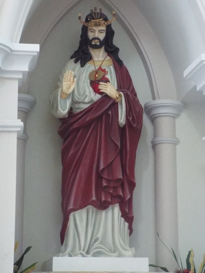 Igreja da Imaculada Conceição Viqueque